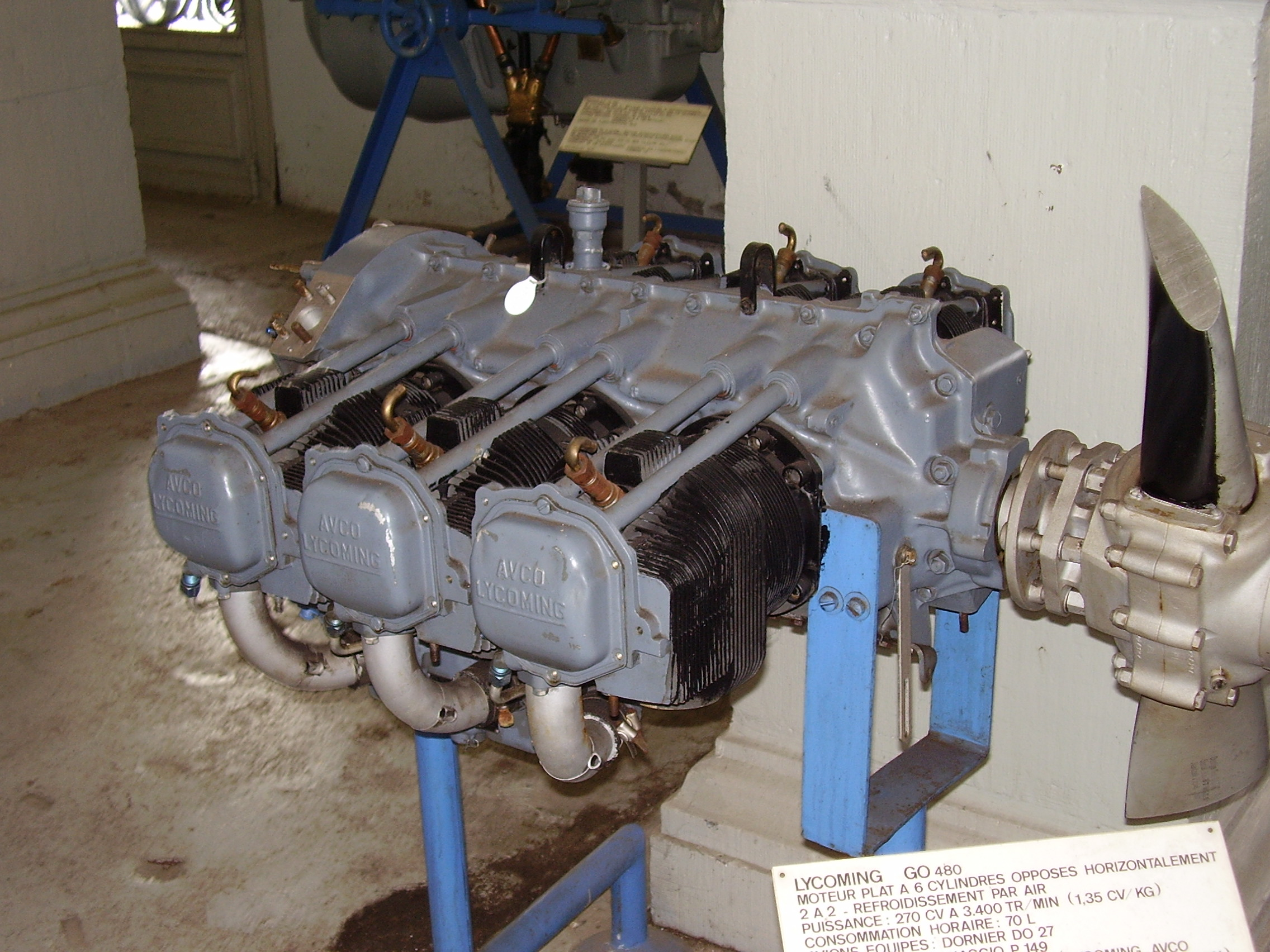 Royal Military Museum Brussels, Musée Royal de l'Armée, Koninklijk Museum van het Leger en de Krijgsgeschiedenis, description in picture Image:Royal Military Museum Brussels 2007 294.JPG, Lycoming GO 480